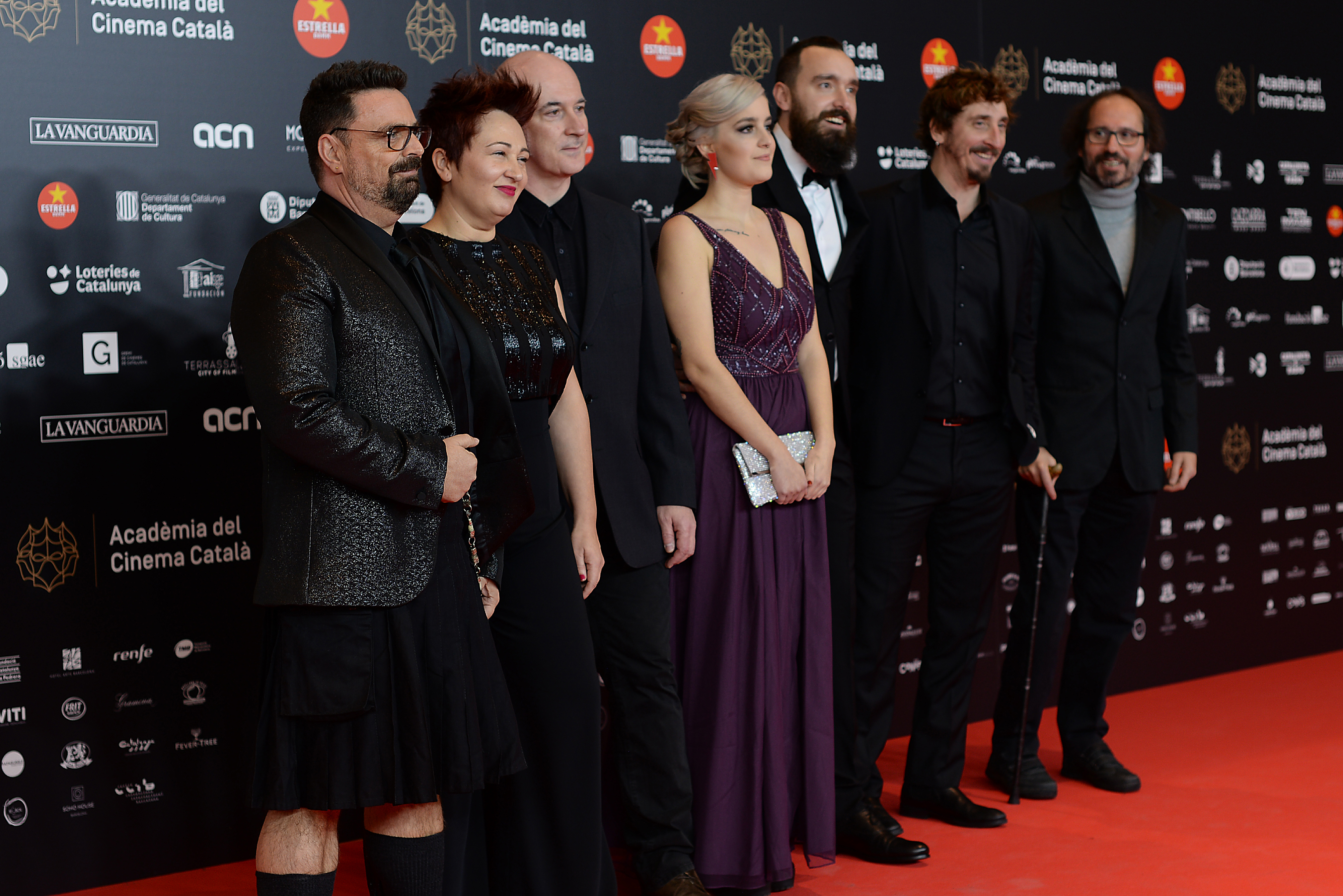 Equip d'El hoyo, XII Premis Gaudí (2020)